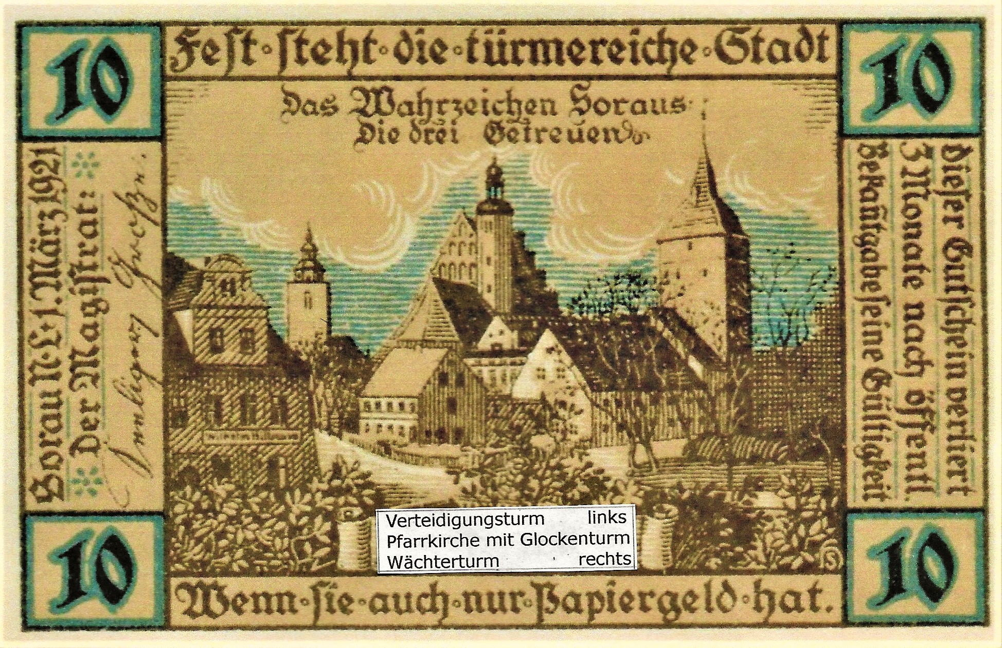 Notgeld der Stadt Sorau, 10 Pfennig von 1921 mit Darstellung der "Drei Getreuen", Türme auf Banderole beschriftet